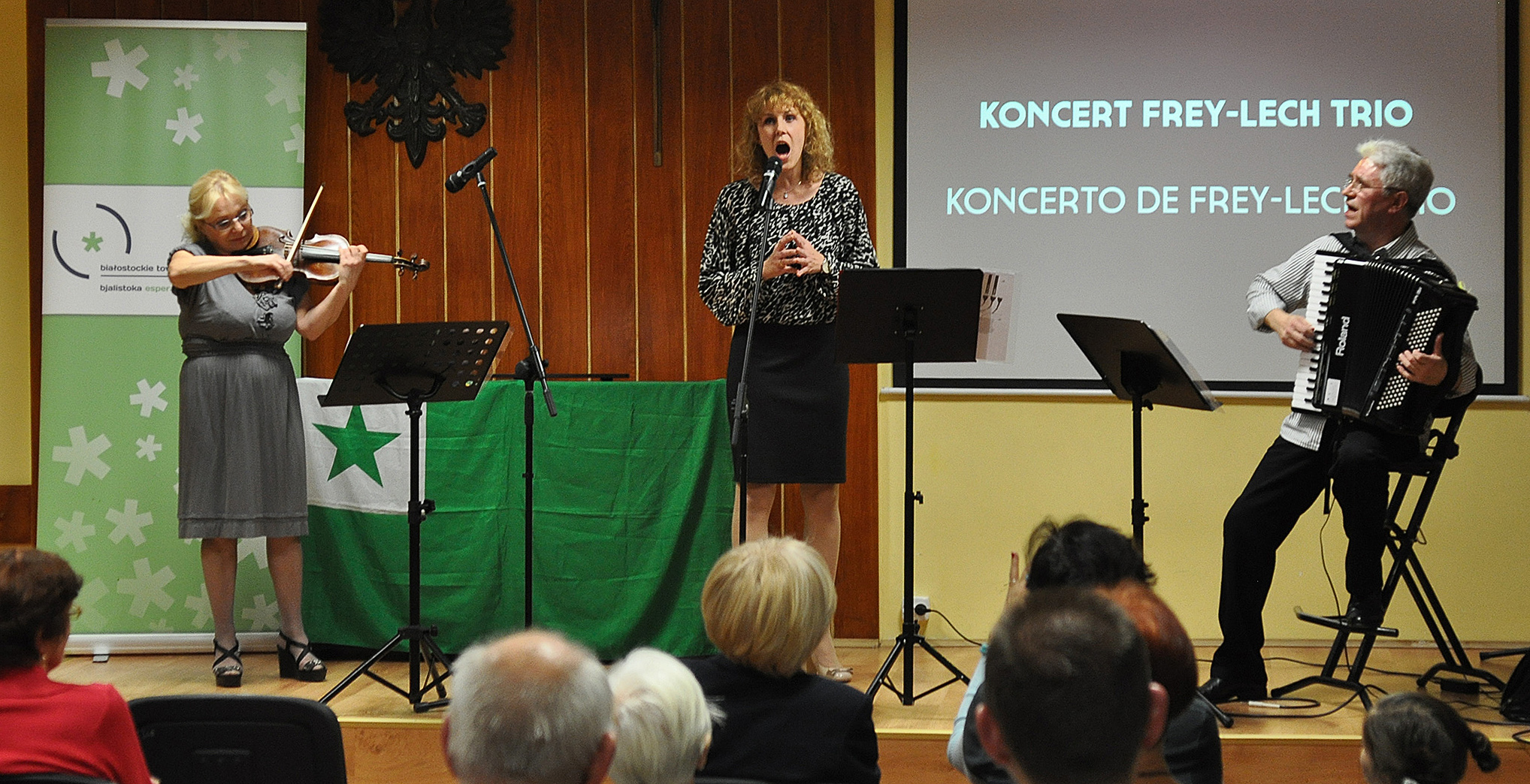 Koncerto de Frey-Lech Trio dum Bjalistokaj Zamenhof-Tagoj, decembro 2016